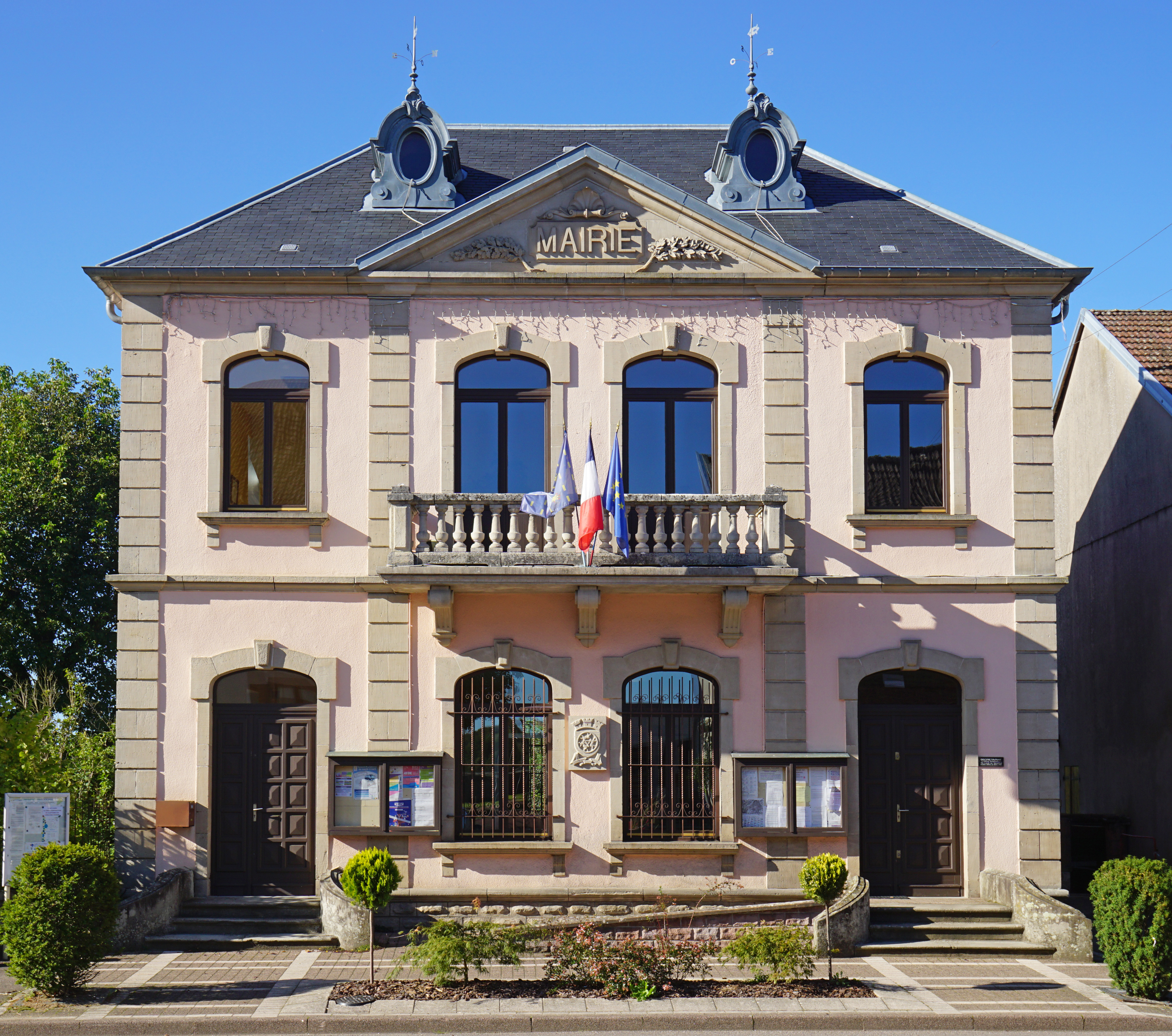 La mairie de Corbenay.